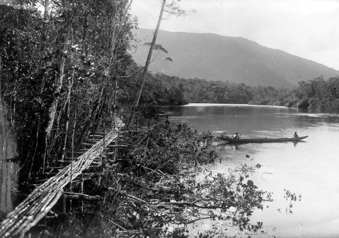 Repronegatief. Pad langs drijfvlak Larona, Celebes